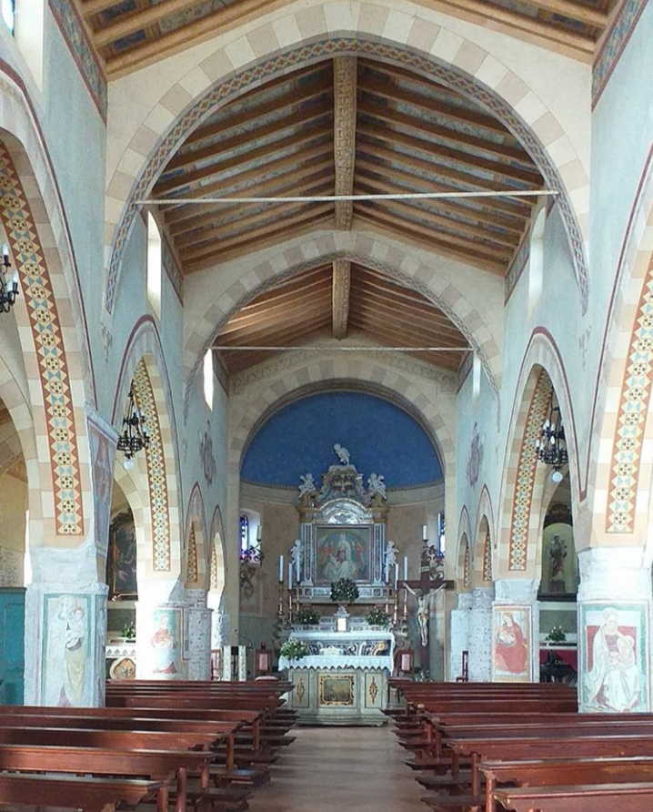 interno pieve formigola